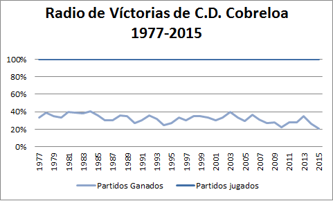 Radio de Víctorias en la ligas en las que ha participado desde el año 1977 hasta 2015.